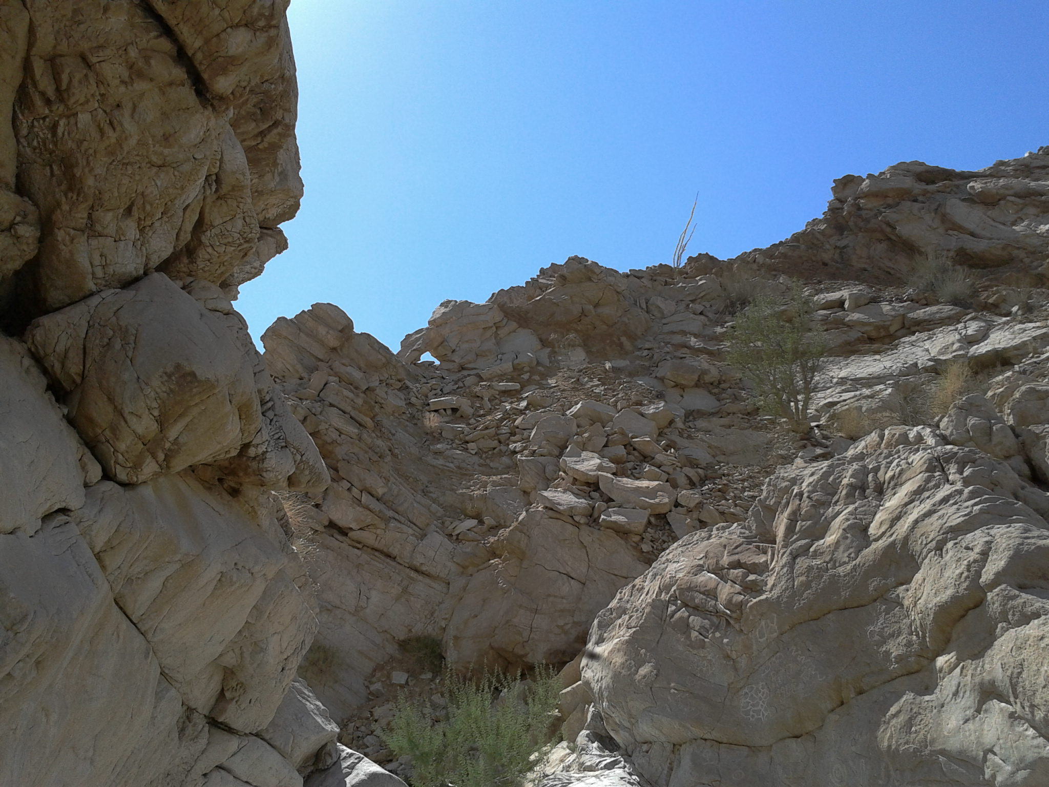 Arco de la tinaja cucapah